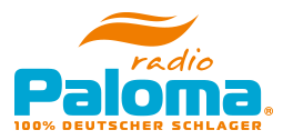 Radio Paloma Logo mit Claim